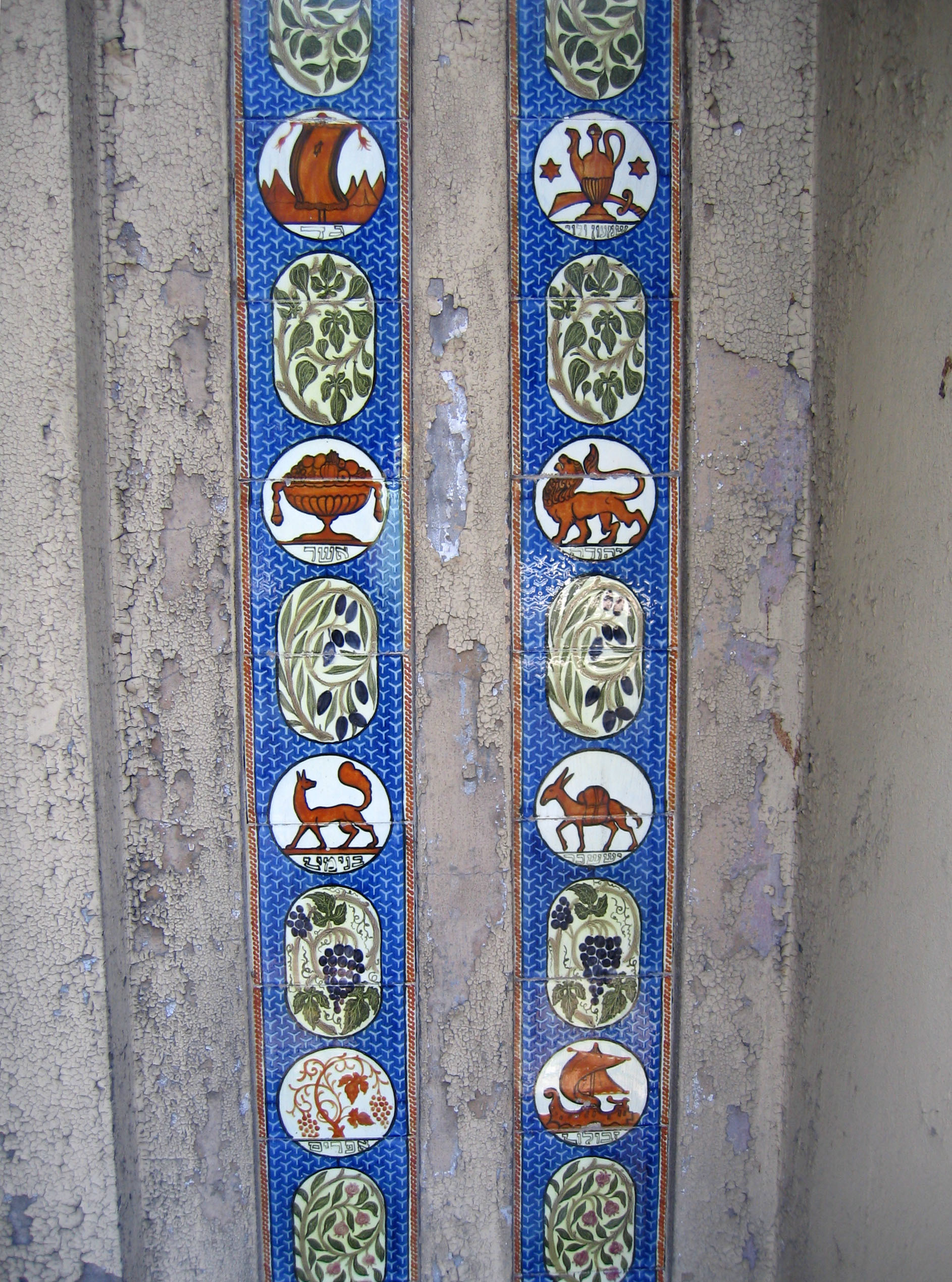 Mosav Zkenim Synagogue